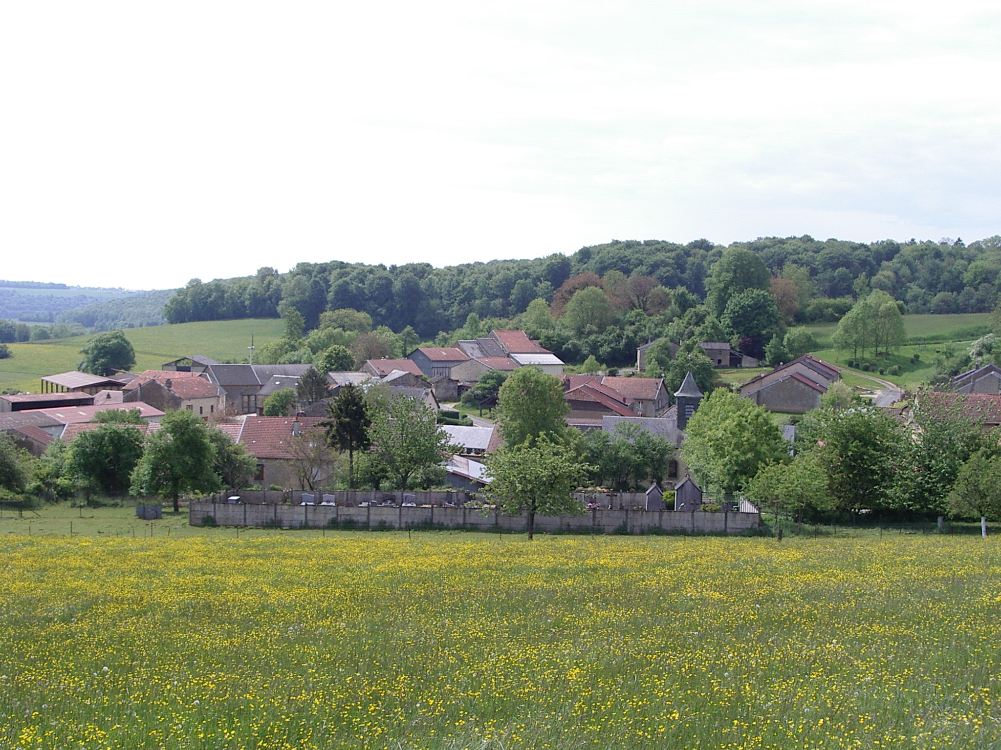 Vue du village de Mondigny, departement des Ardennes, France